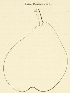 Poire Messire Jean, silhouette, Dictionnaire de Pomologie, André Leroy (1801-1875), 1867.